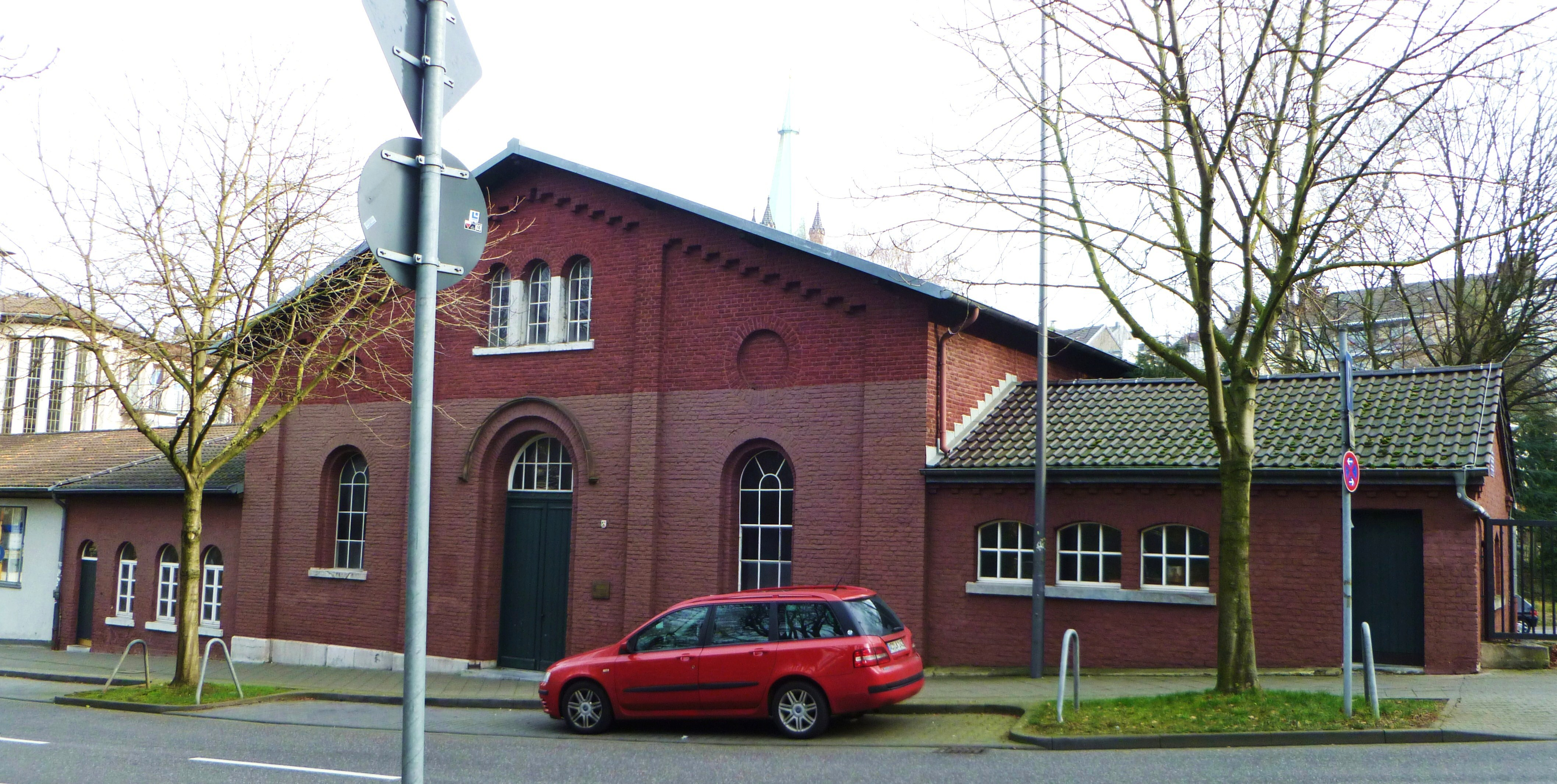 Baudenkmal in Aachen-Mitte